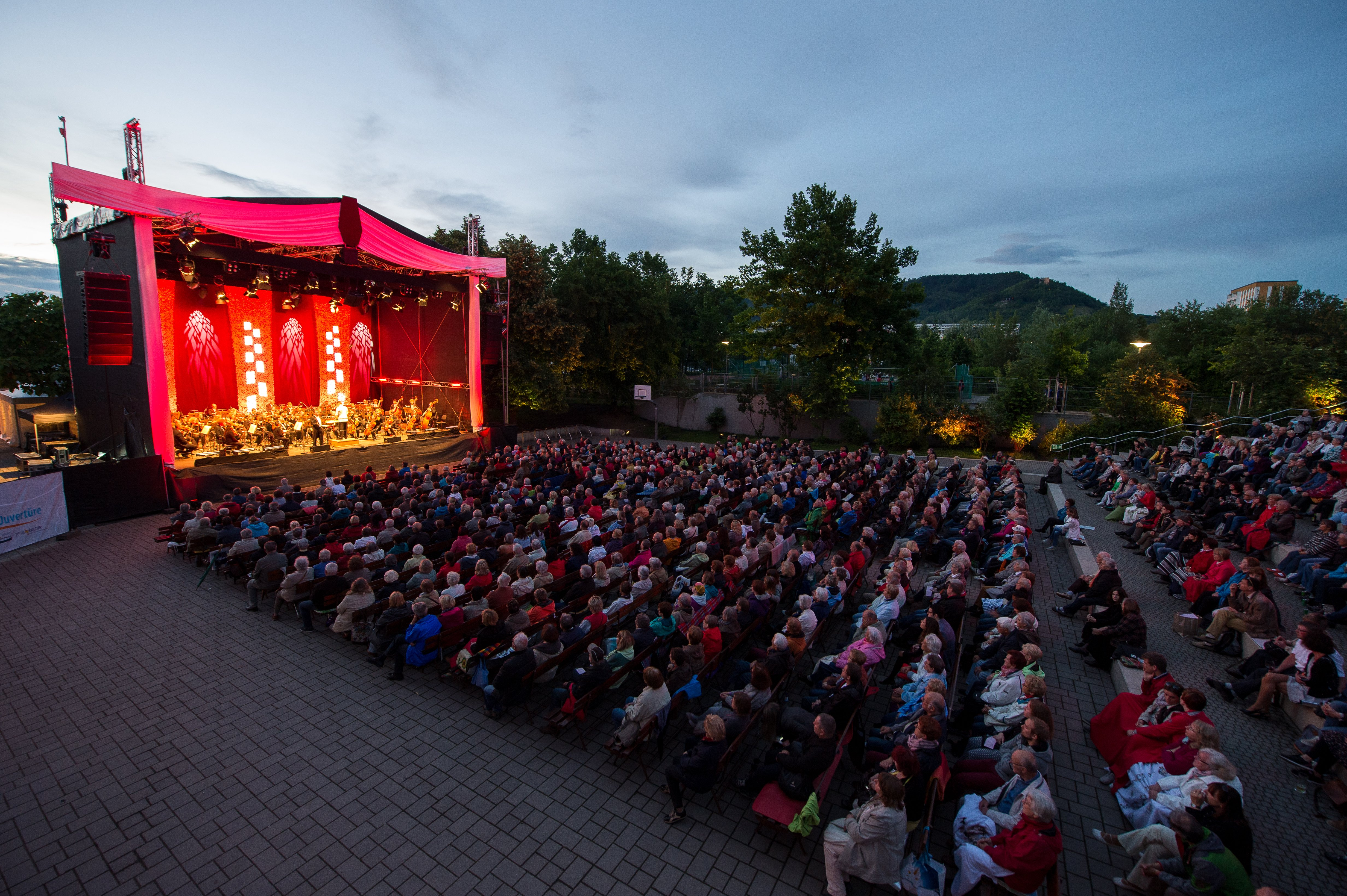 ArenaOuvertüre